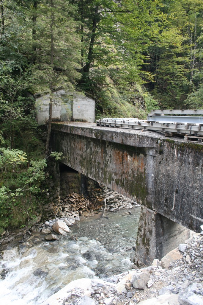 Aquädukt, führt Wasser von der Grossen Melchaa über die Kleine Melchaa zum Lungerersee